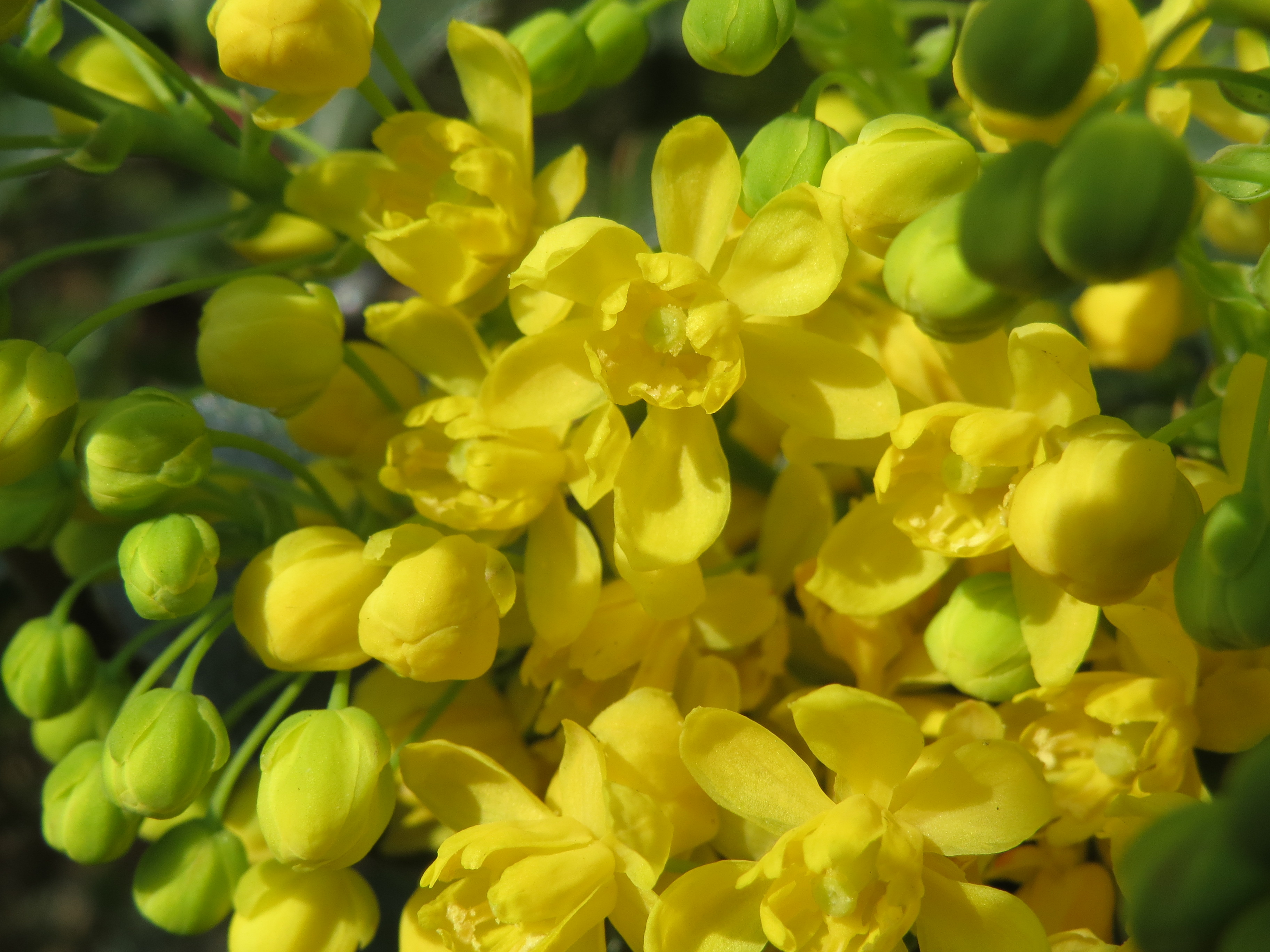 Gewöhnliche Mahonie (Mahonia aquifolium) in Hockenheim